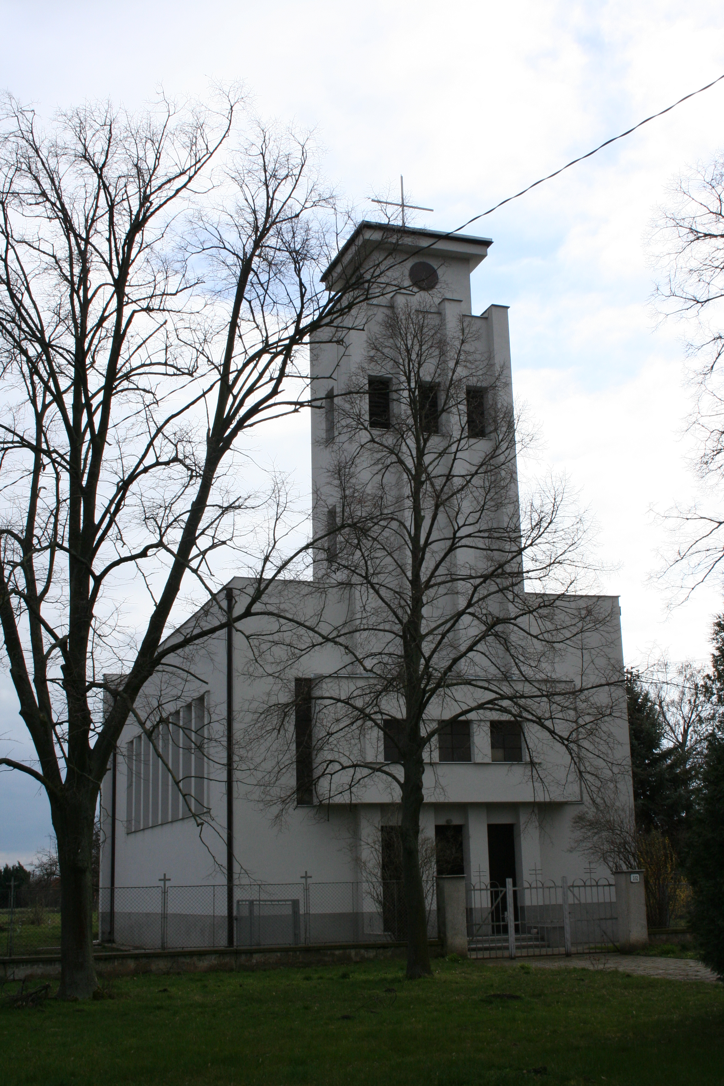 Dögös